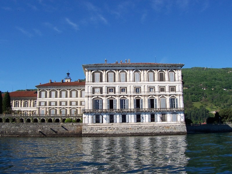 Palazzo Borromeo sull'Isola Bella (Stresa).